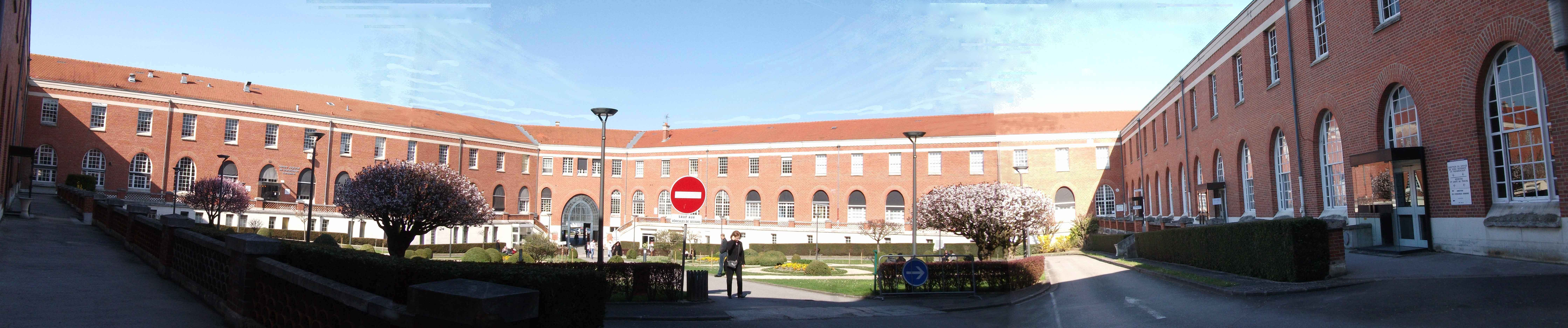 vue de la Cour d'entrée intérieure du C.H.R.U de Reims.